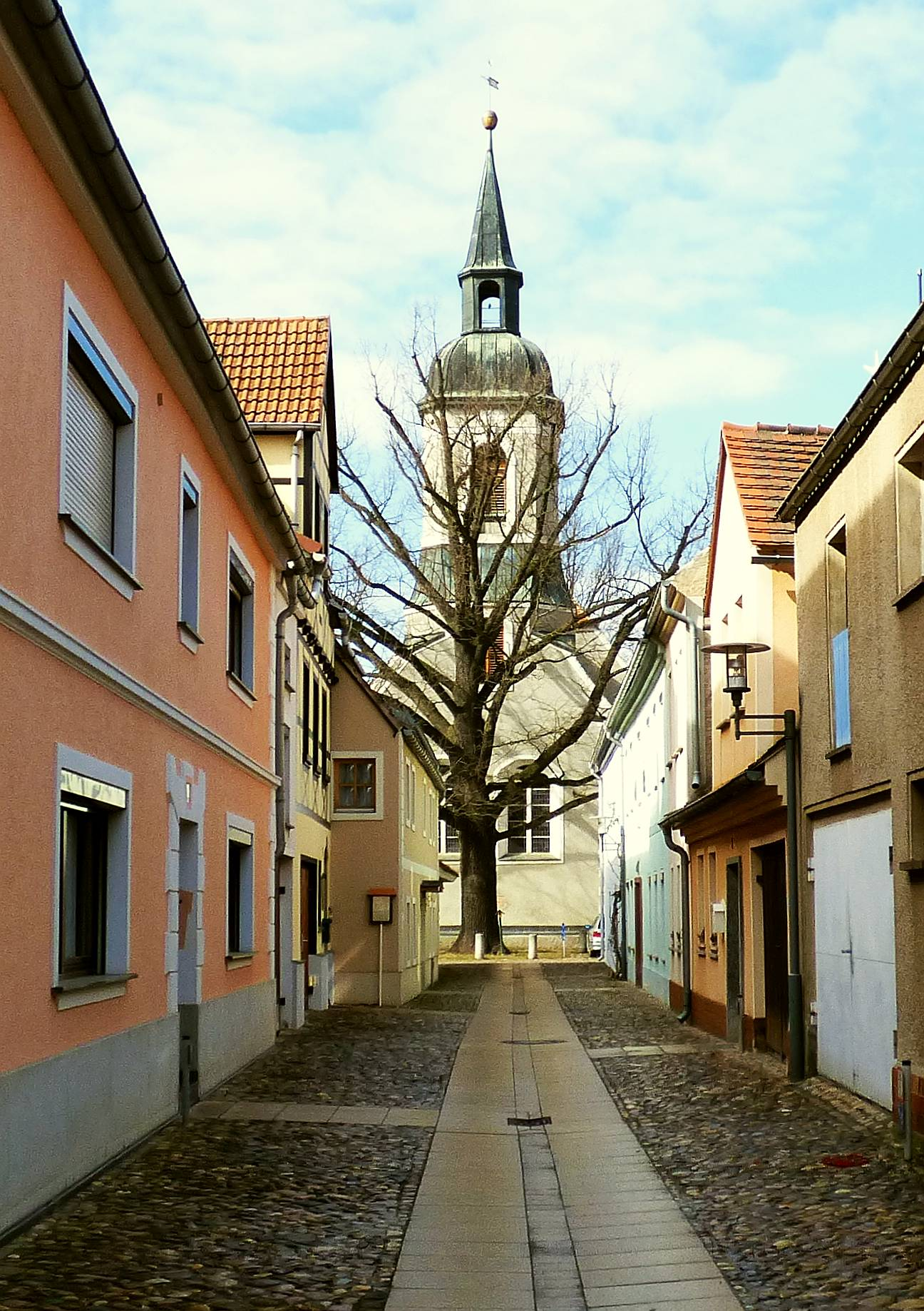 Die Kirchgasse in Ortrand. Im Hintergrund ist die Stadtkirche St. Barbara zusehen. Diese wurde im 16. Jahrhundert errichtet und nach einem Brand im Jahre 1707, der das Bauwerk schwer in Mitleidenschaft zog, unter dem Erbauer der Dresdner Frauenkirche George Bähr erneuert und mit dem heute zusehenden Turm versehen.